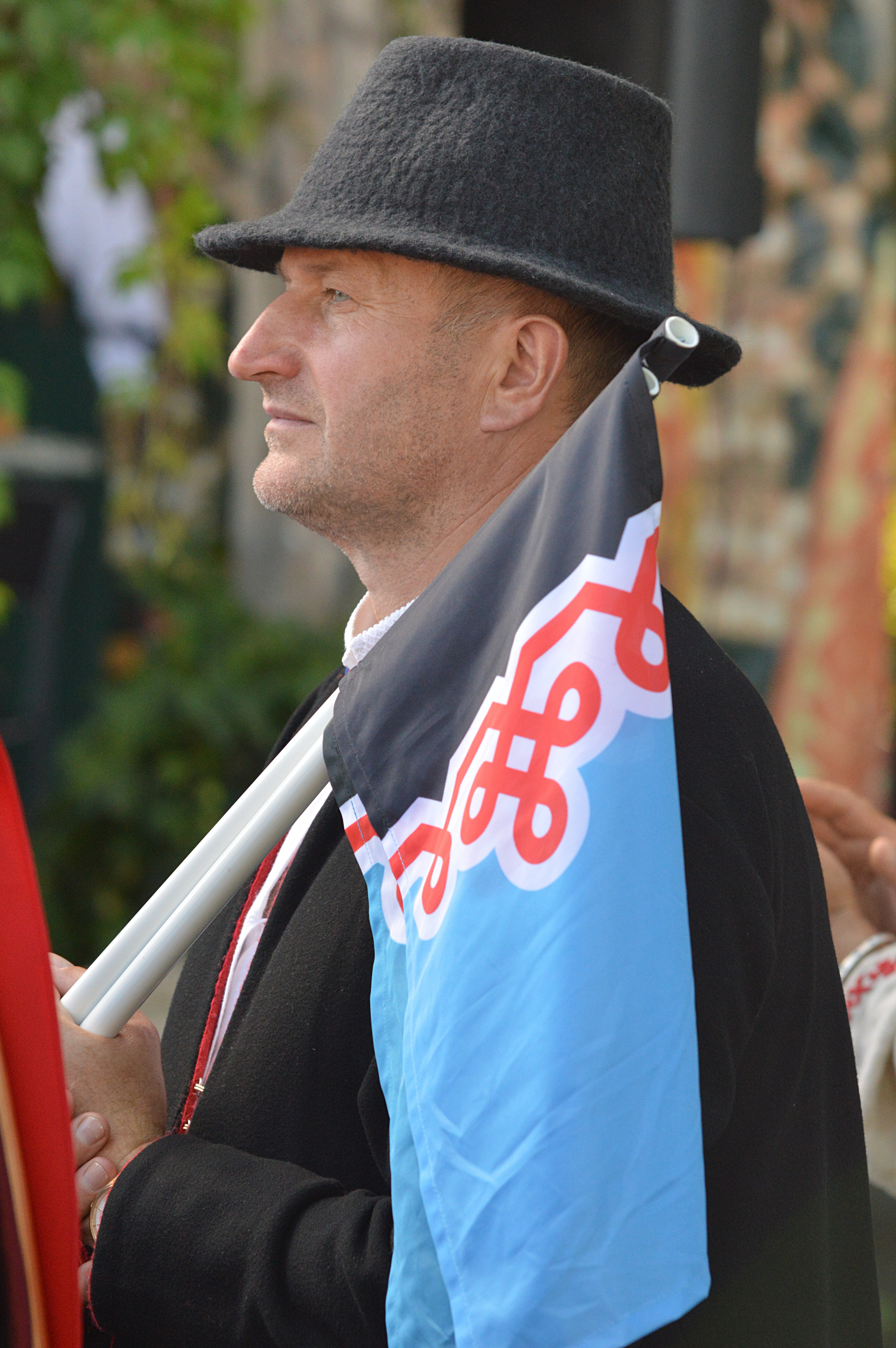 Seto kultuuri festival Radajal.